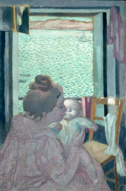 Maternité devant la mertitle QS:P1476,fr:"Maternité devant la mer" label QS:Lfr,"Maternité devant la mer" or